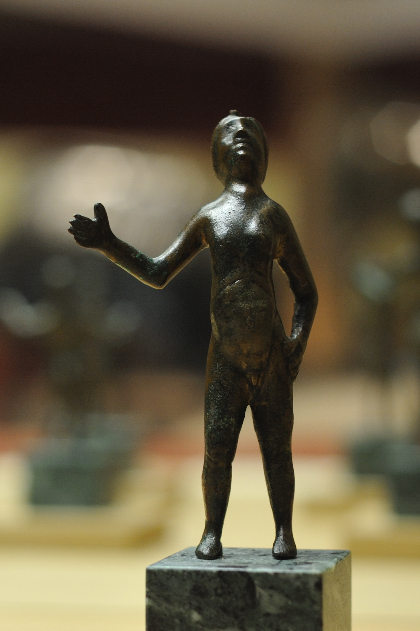 L'homme cambré, statue en alliage cuivreux de la période Ier siècle av. J.-C. - Ier siècle ap. J.-C., découverte à Neuvy-en-Sullias en 1861 et exposée au musée historique et archéologique de l'Orléanais, Orléans, Loiret, France